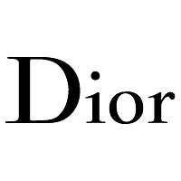 Le logo de Dior